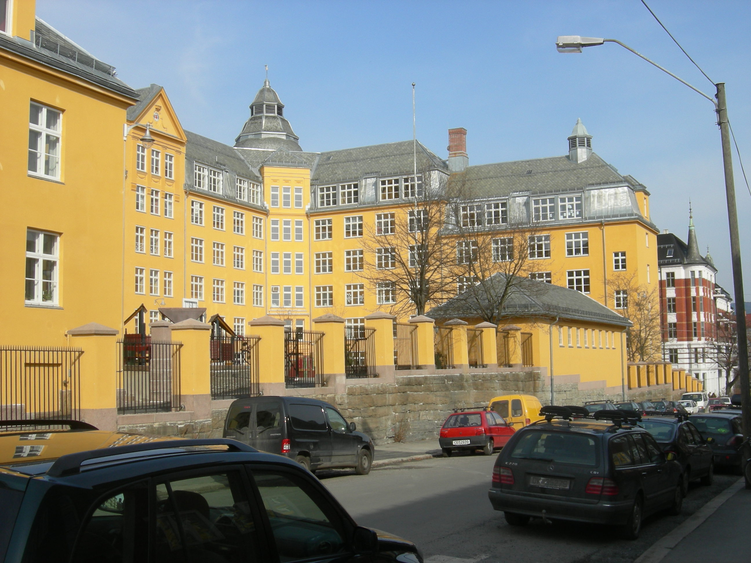 Ila skole, built 1916, Oslo, seen from Fougstads gate